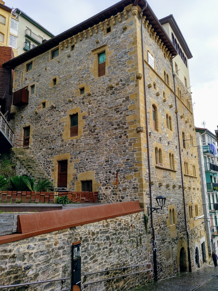 Mutrikuko Berriatua dorretxea